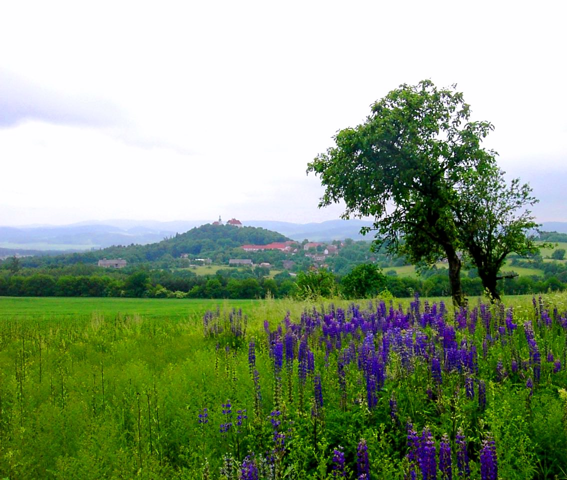 Pohled na obec Vysoký Chlumec a na zámek od severu.